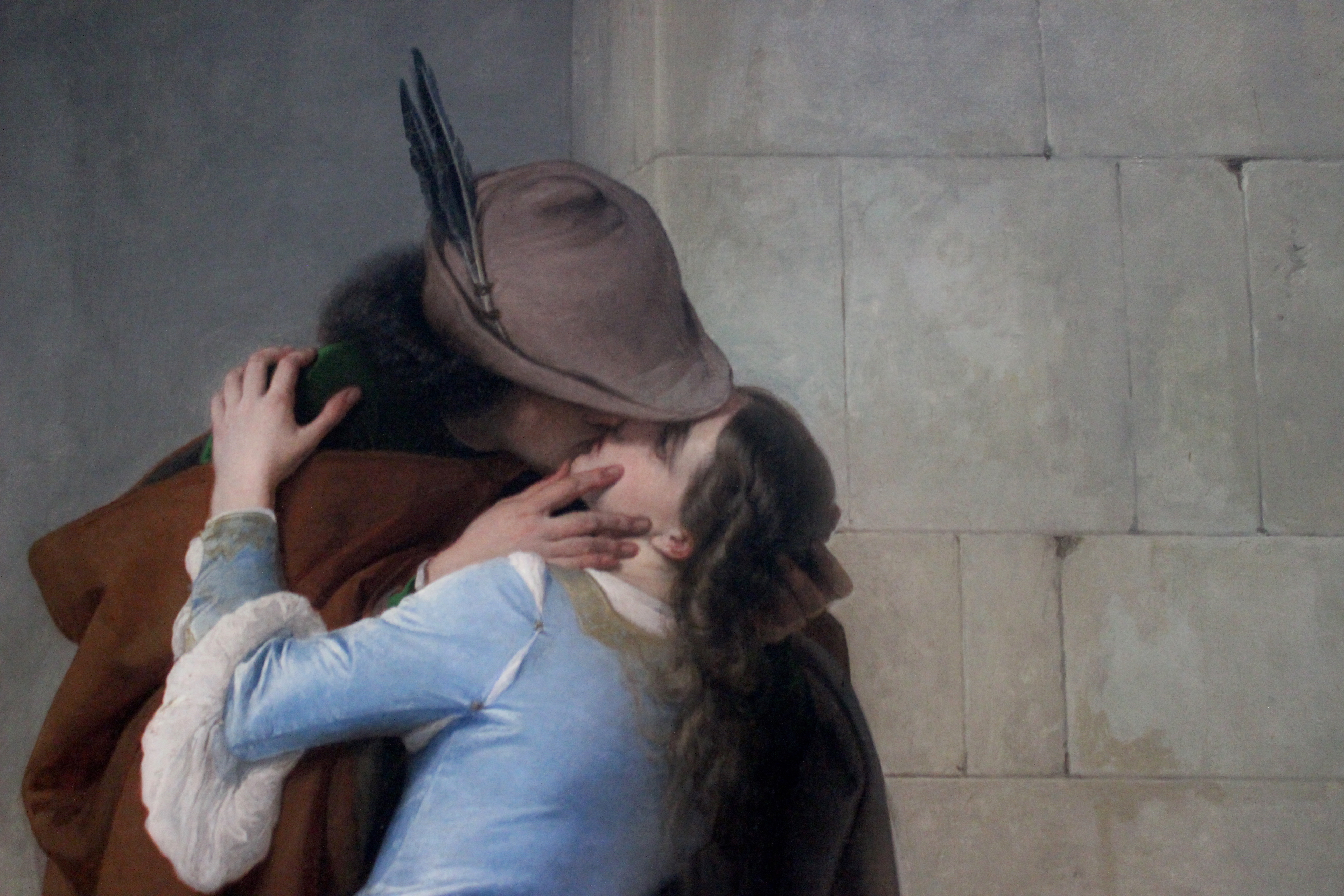 Milán, Pinacoteca di Brera. El beso por Francesco Hayez.